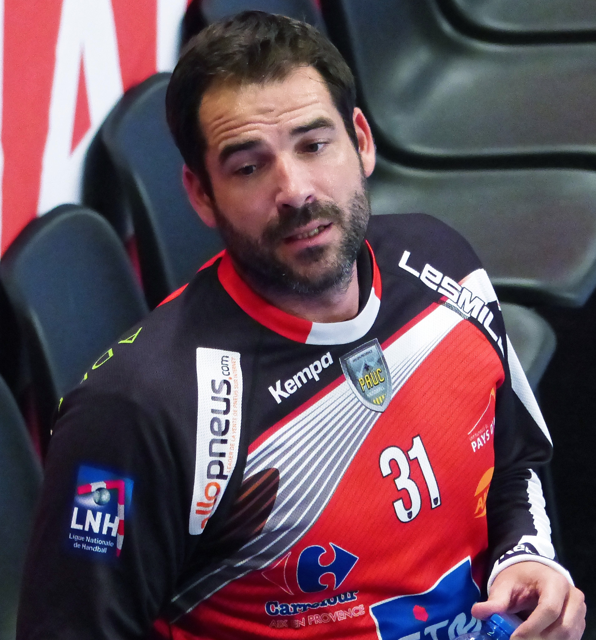 Rencontre entre le PSG Handball et Pays. A Coubertin, le 11 septembre 2014.